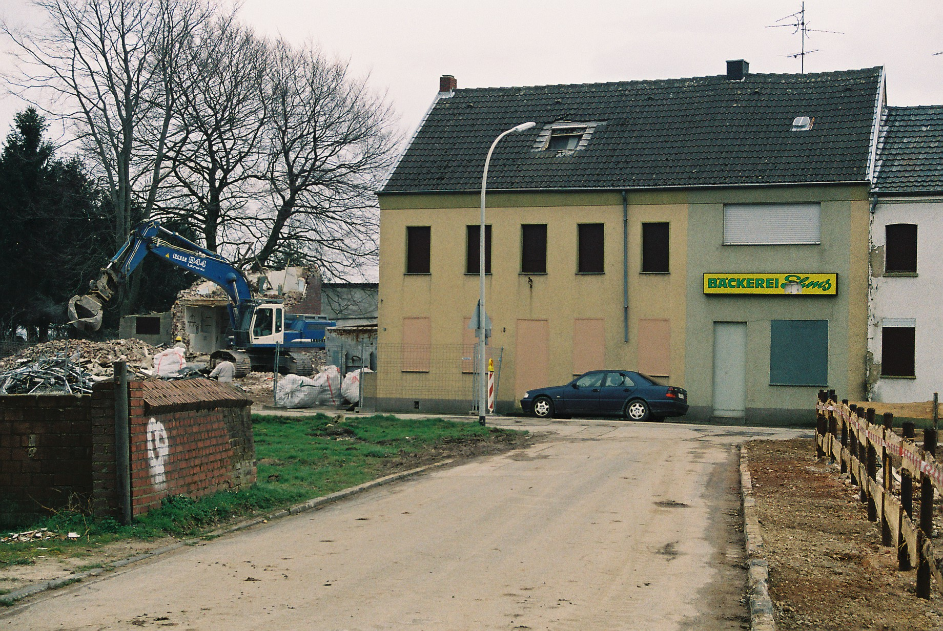 Ehemalige Bäckerei von Jüchen-Holz, das dem Braunkohletagebau Garzweiler II weichen muss.